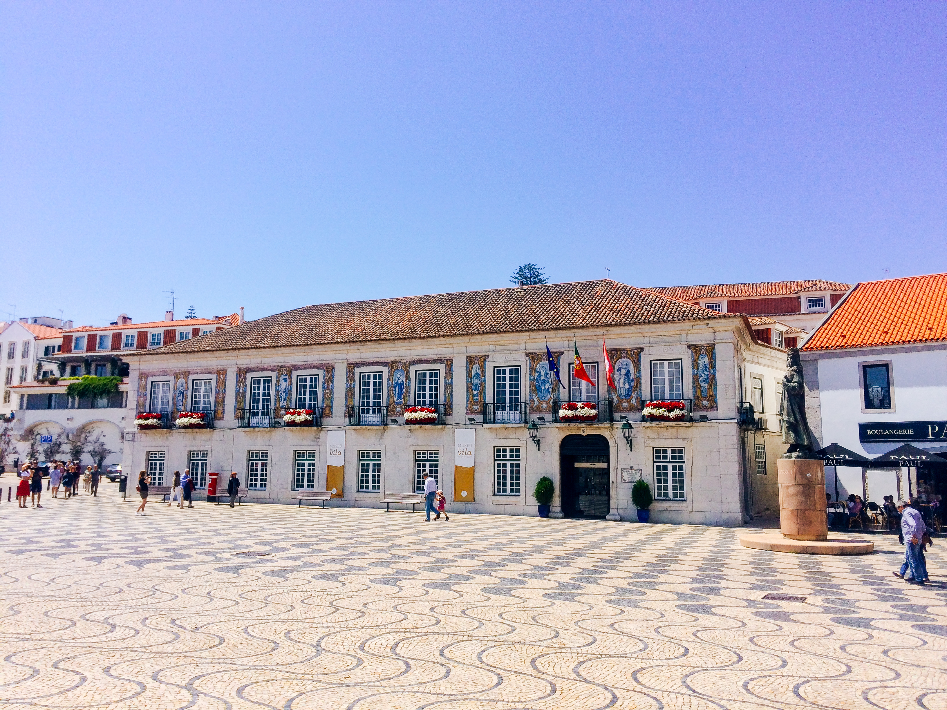 Palácio dos Condes da Guarda